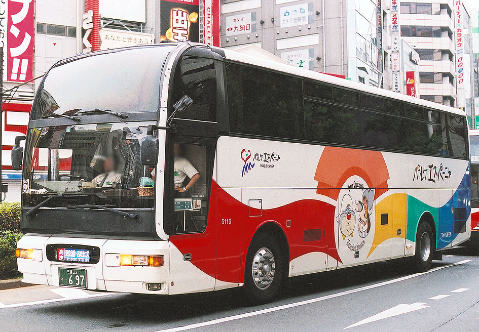 三交伊勢志摩交通 いすゞスーパークルーザー U-LV771R 富士重7S パルケエスパーニャ色